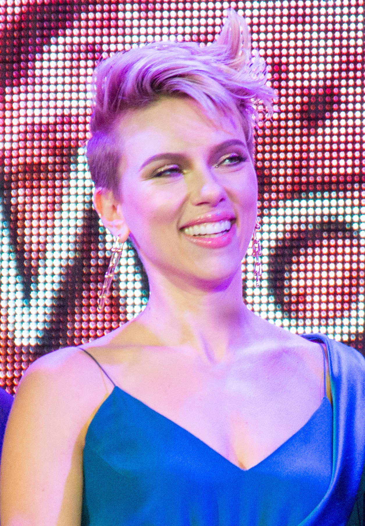 ゴースト・イン・ザ・シェル ワールドプレミアレッドカーペット ピルー・アスベック ビートたけし スカーレット・ヨハンソン ジュリエット・ビノシュ ルパート・サンダース 桃井かおり